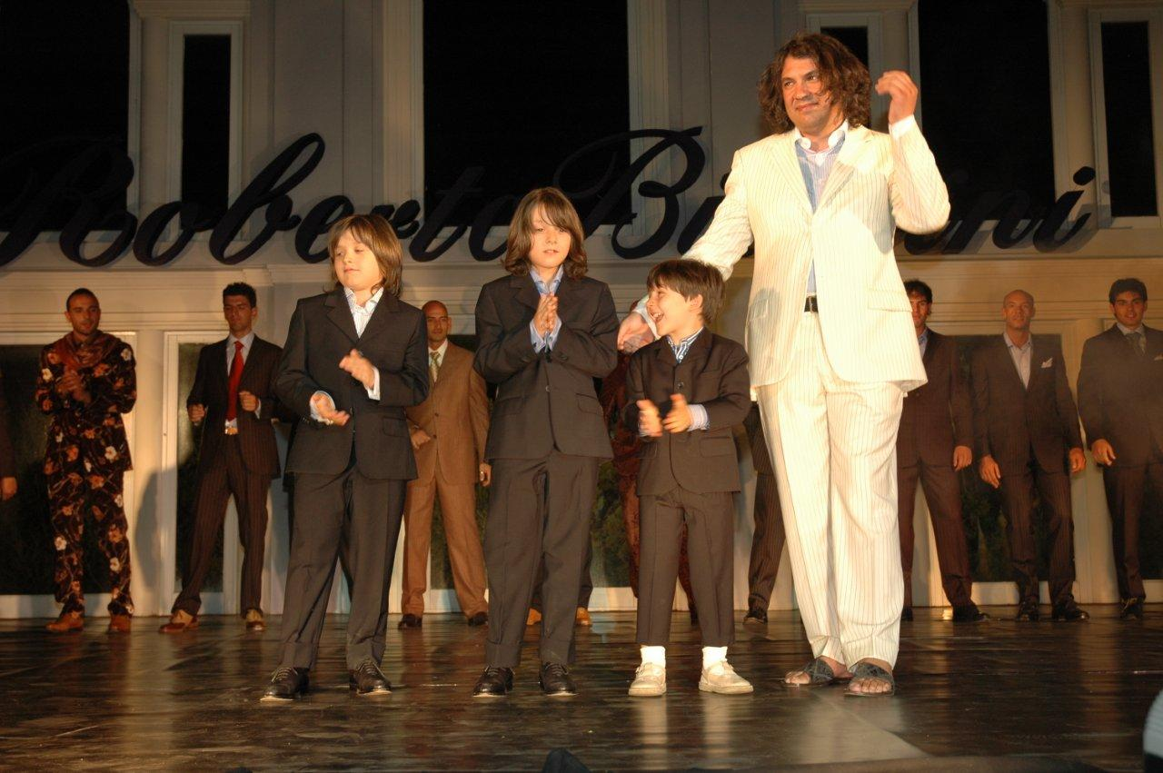 2007. Sfilata a Porto Rotondo. Roberto Biagini con le creazioni delle quali va più orgoglioso: i suoi figli.